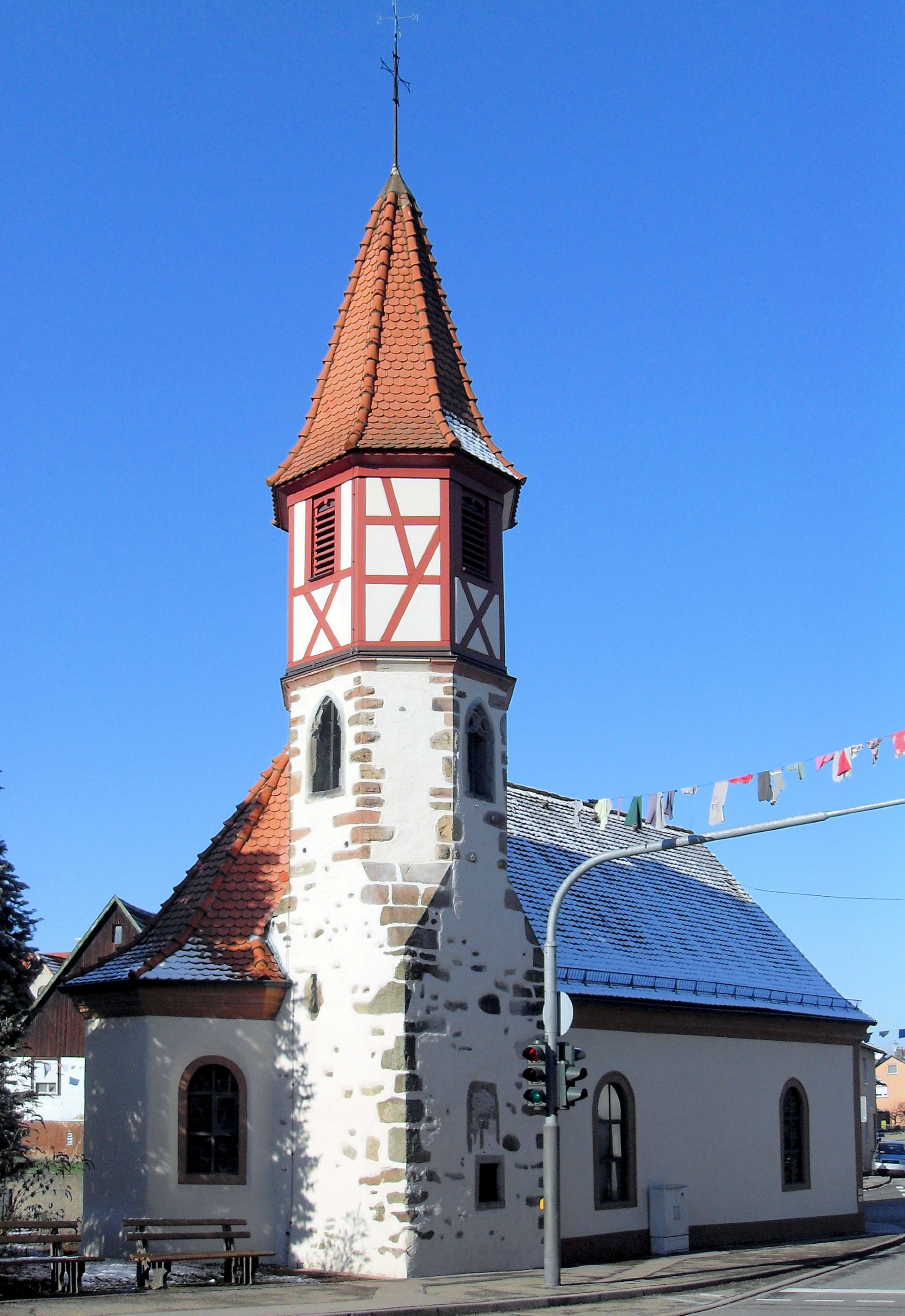 St.-Annen-Kapelle in Bischweier